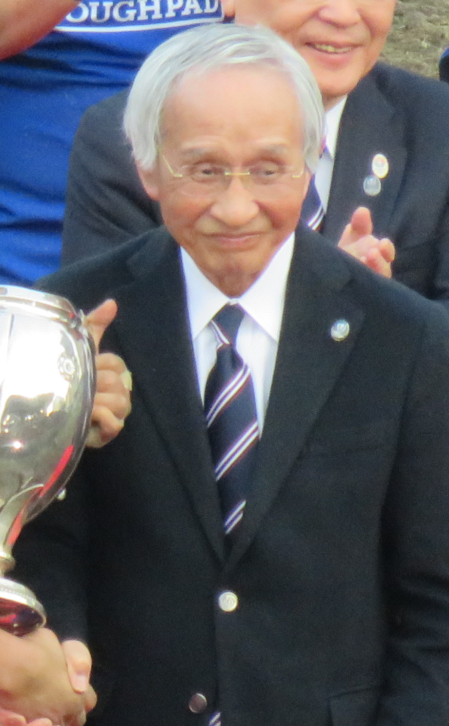 第53回日本ラグビーフットボール選手権大会での、日本ラグビーフットボール協会の岡村正会長